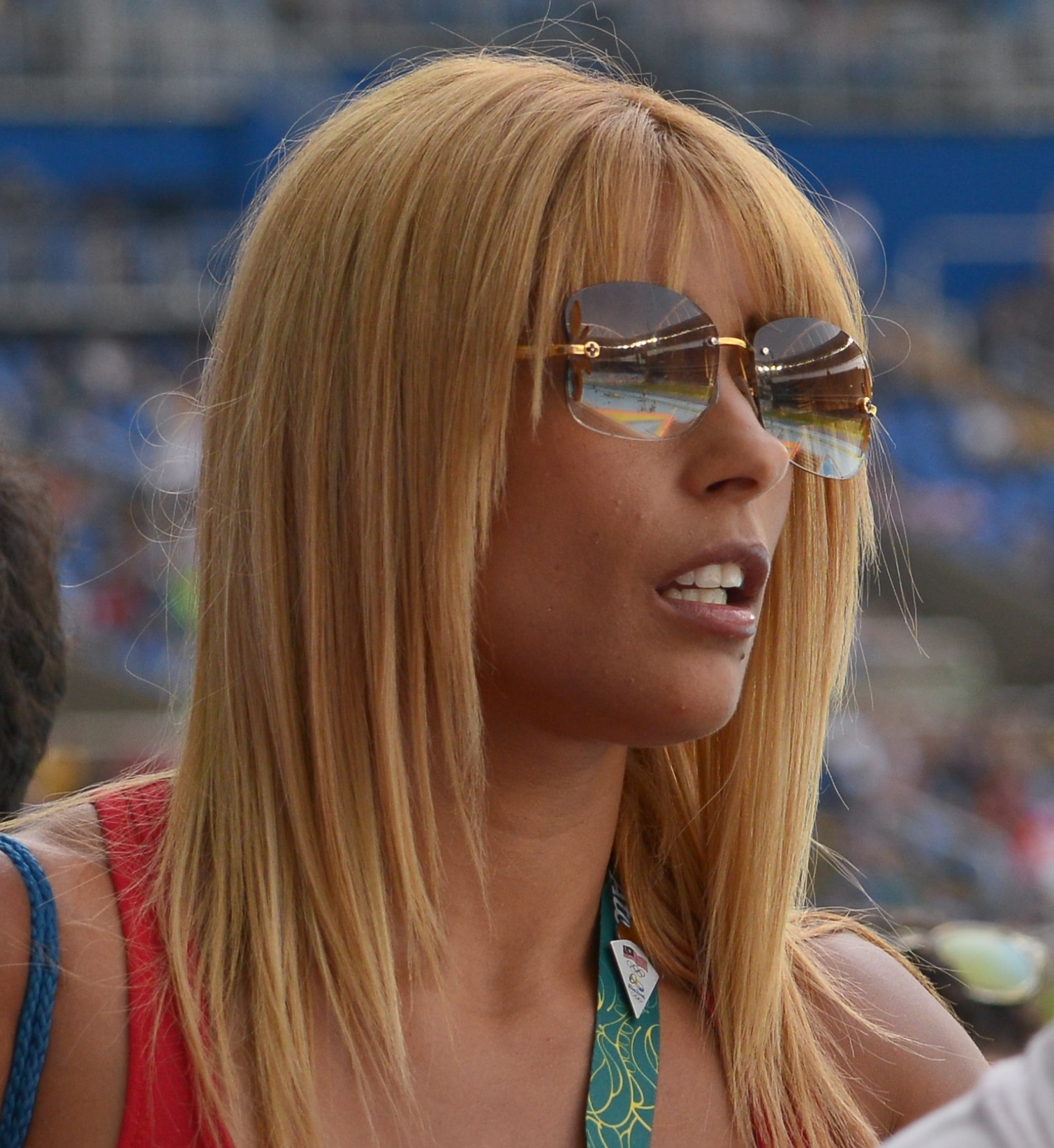 Syrine Balti-Ebondo au stade olympique de Rio de Janeiro